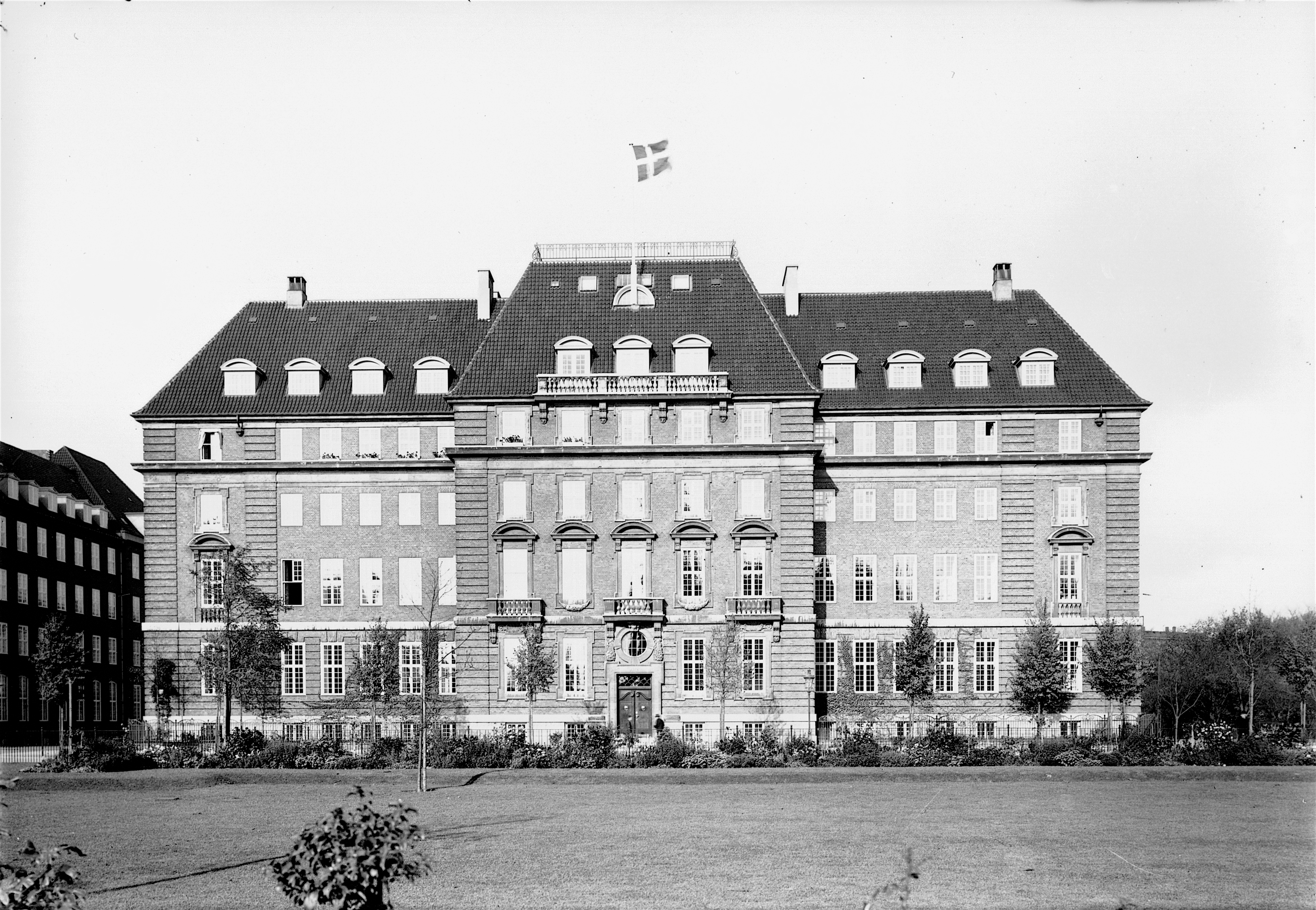 Østifternes Kreditforenings hovedsæde ved Jarmers Plads, København, tegnet af arkitekterne Ulrik Plesner[1] og Valdemar Dan[2], 1. præmie i konkurrence 1913, færdiggjort 1916, nedrevet 1954 for at give plads til en udvidelse og forlængelse af H. C. Andersens Boulevard til Gyldenløvesgade. Til venstre for bygningen ses den smalle Jarmersgade og til højre Ørstedsparken.[3]